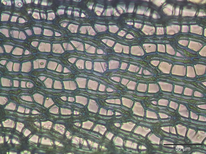 Sphagnum warnstorfii, Astblatt-Zellen, 400x